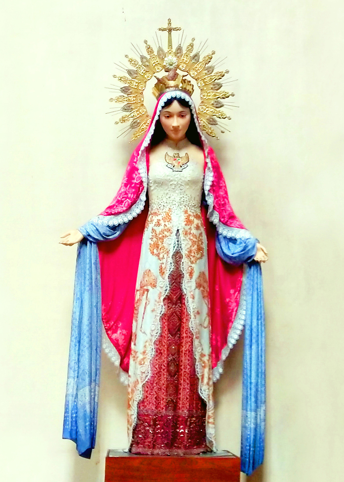 Patung Maria Bunda Segala Suku di Gereja Katedral Jakarta